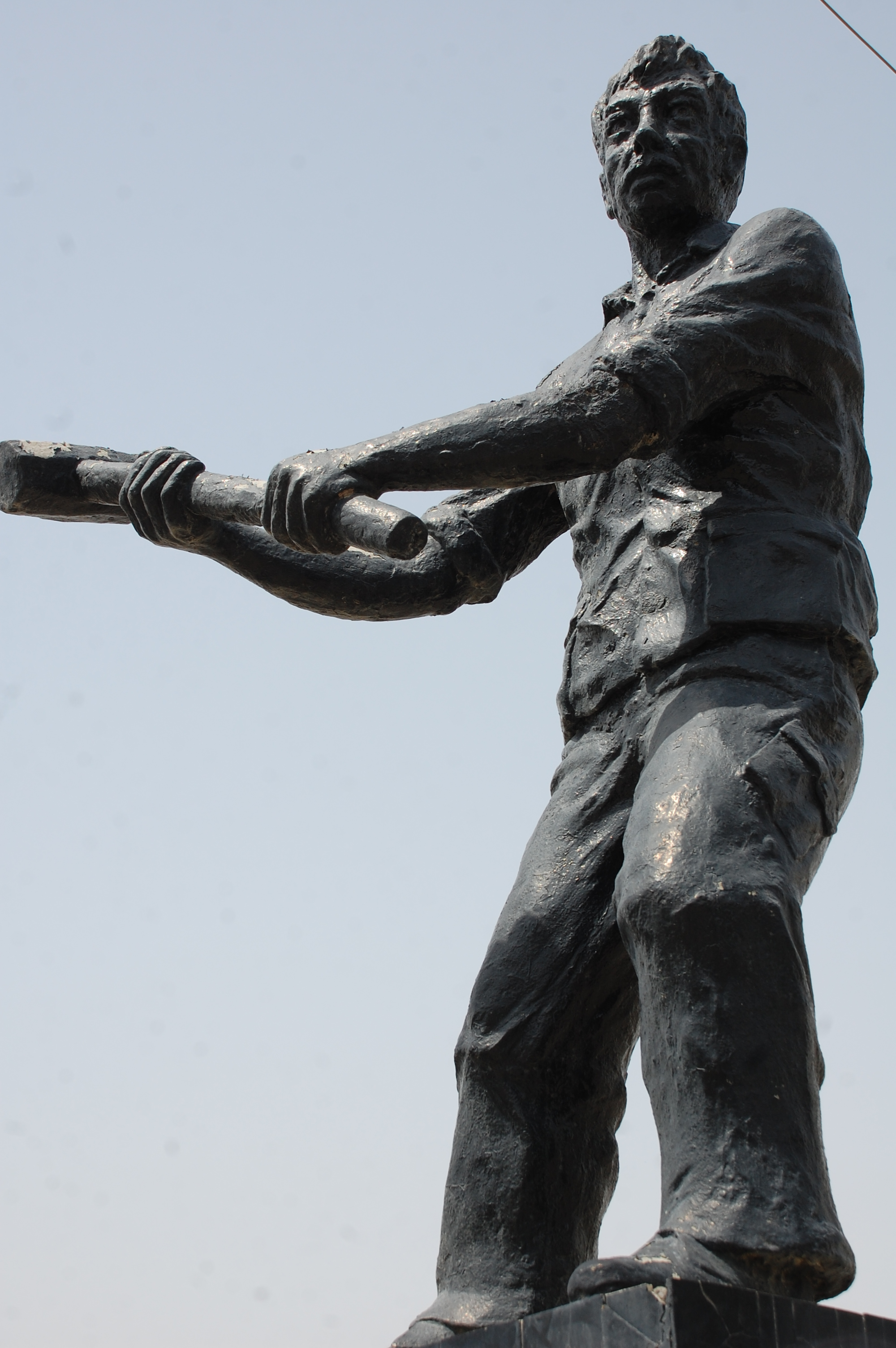 تمثال العامل الواقع في ساحة ام البروم في العشار - البصرة